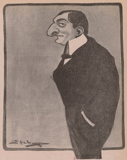 Henri Letellier par Camara, Collection Jaquet